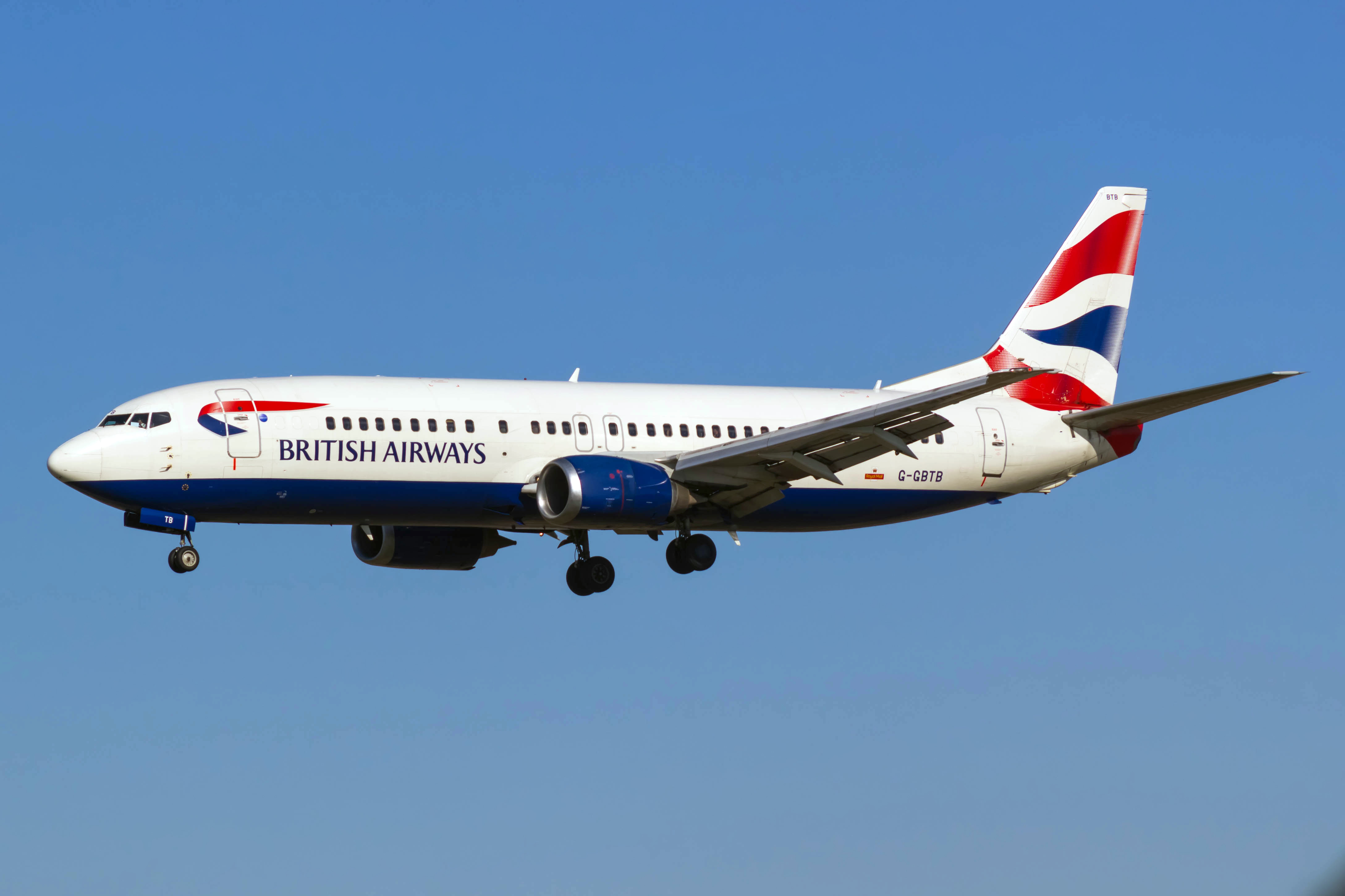 Boeing 737 de British Airways aterrando no aeroporto de Barcelona.